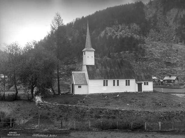 Jostedal kyrkje